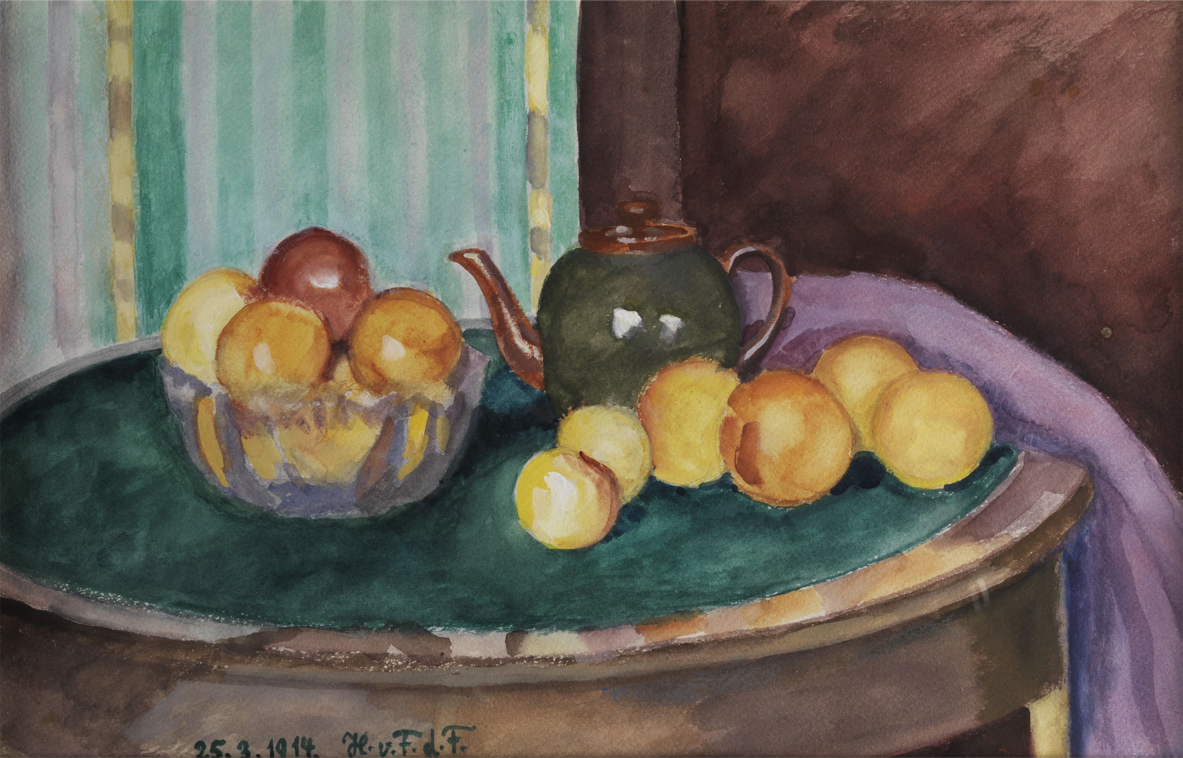 Stillleben mit Teekanne und Obstschale; Deckfarben, Gouache auf Karton. 22,5 x 35 cm. Datiert "25.03.1914".